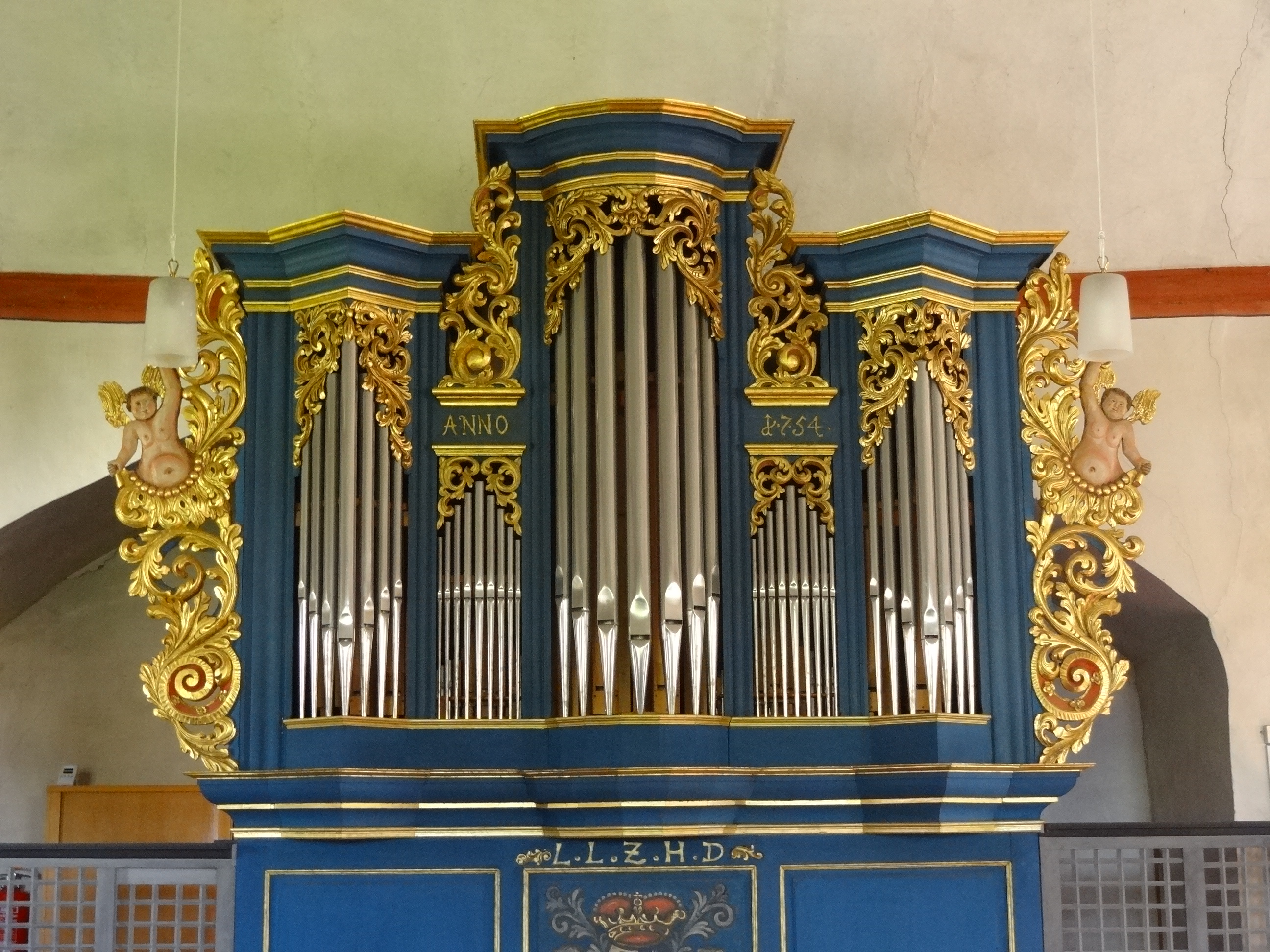 Evangelische Pfarrkirche (Ostheim)